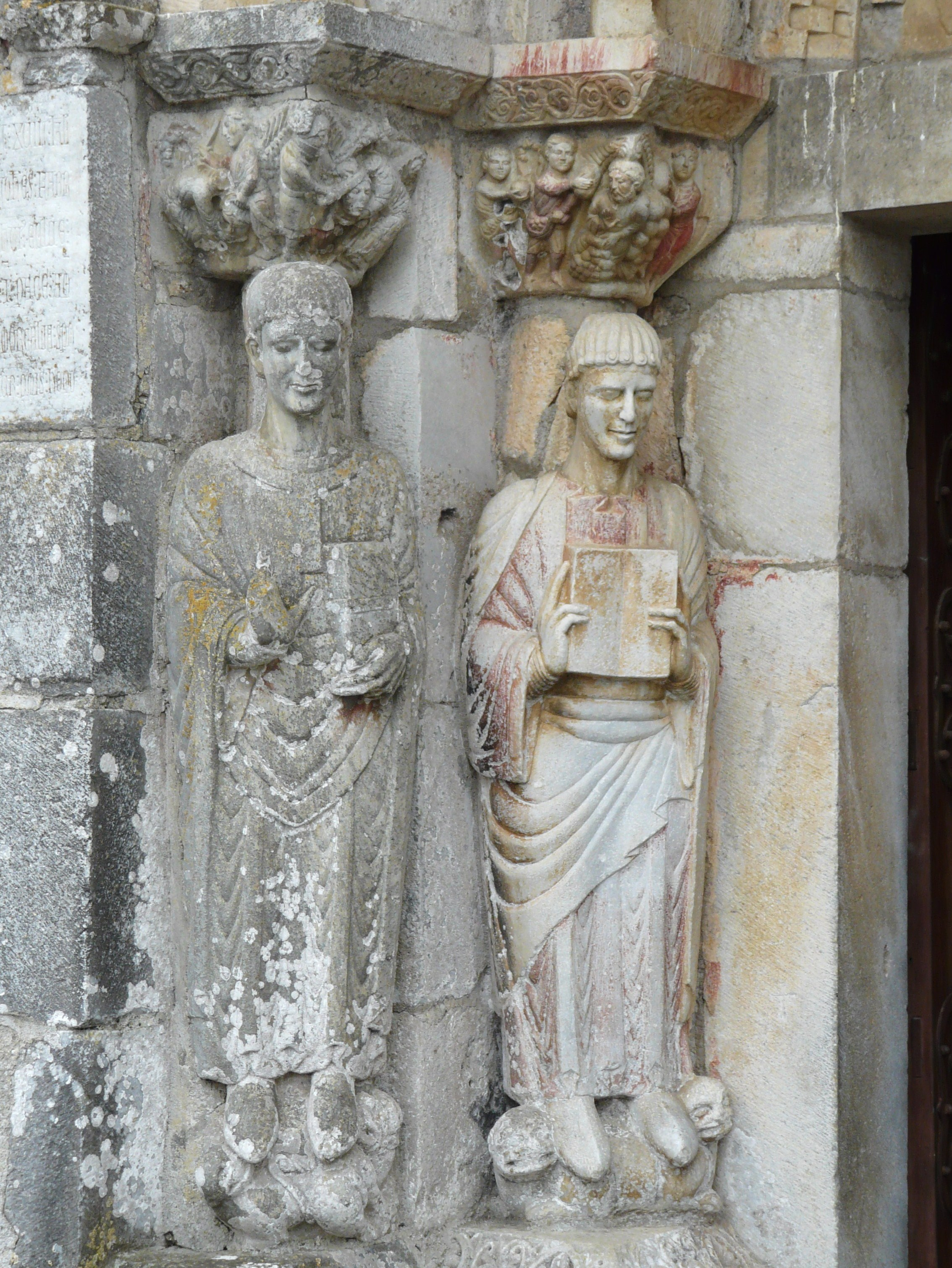 Piédroit gauche du portail représentant saint Just et du diacre saint-Étienne, basilique Saint-Just de Valcabrère, Haute-Garonne, France.